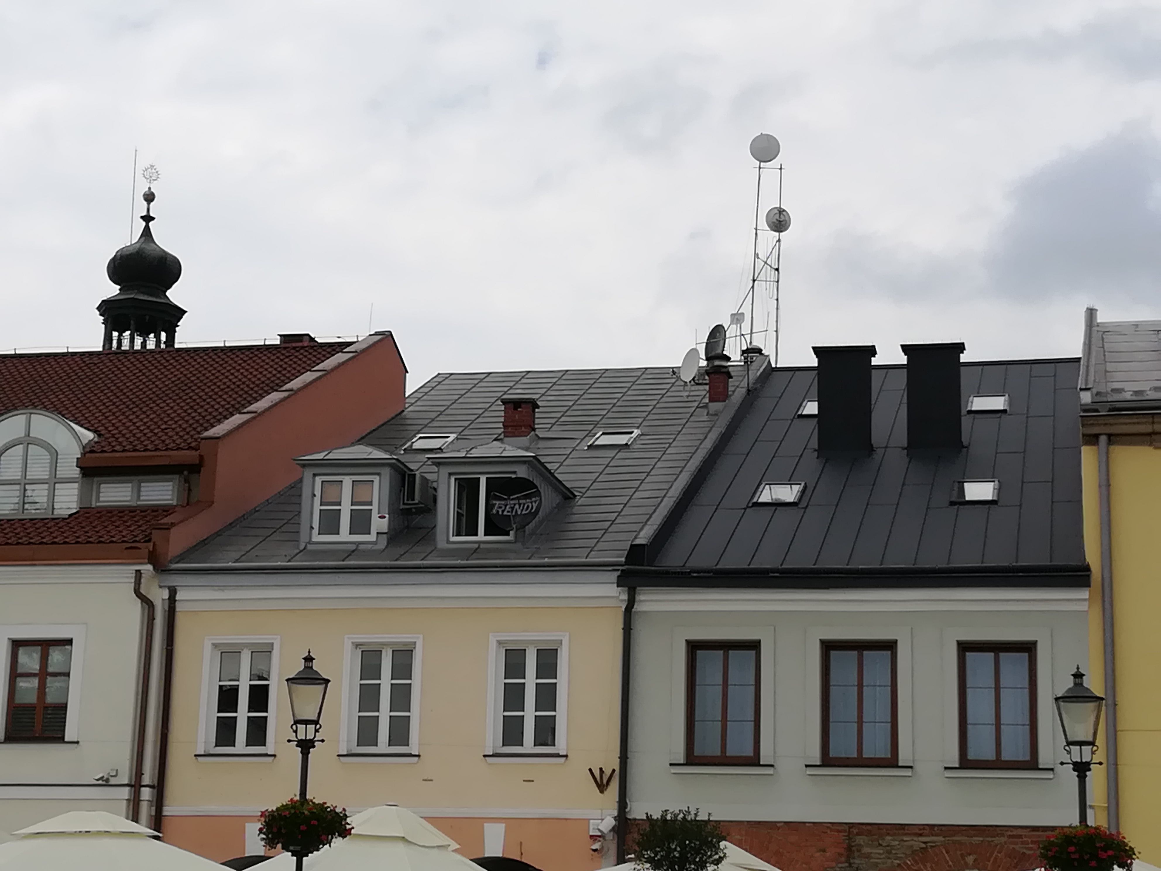 Siedziba Trendy Radio Krosno